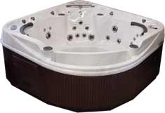 Club Piscine spa overfloading